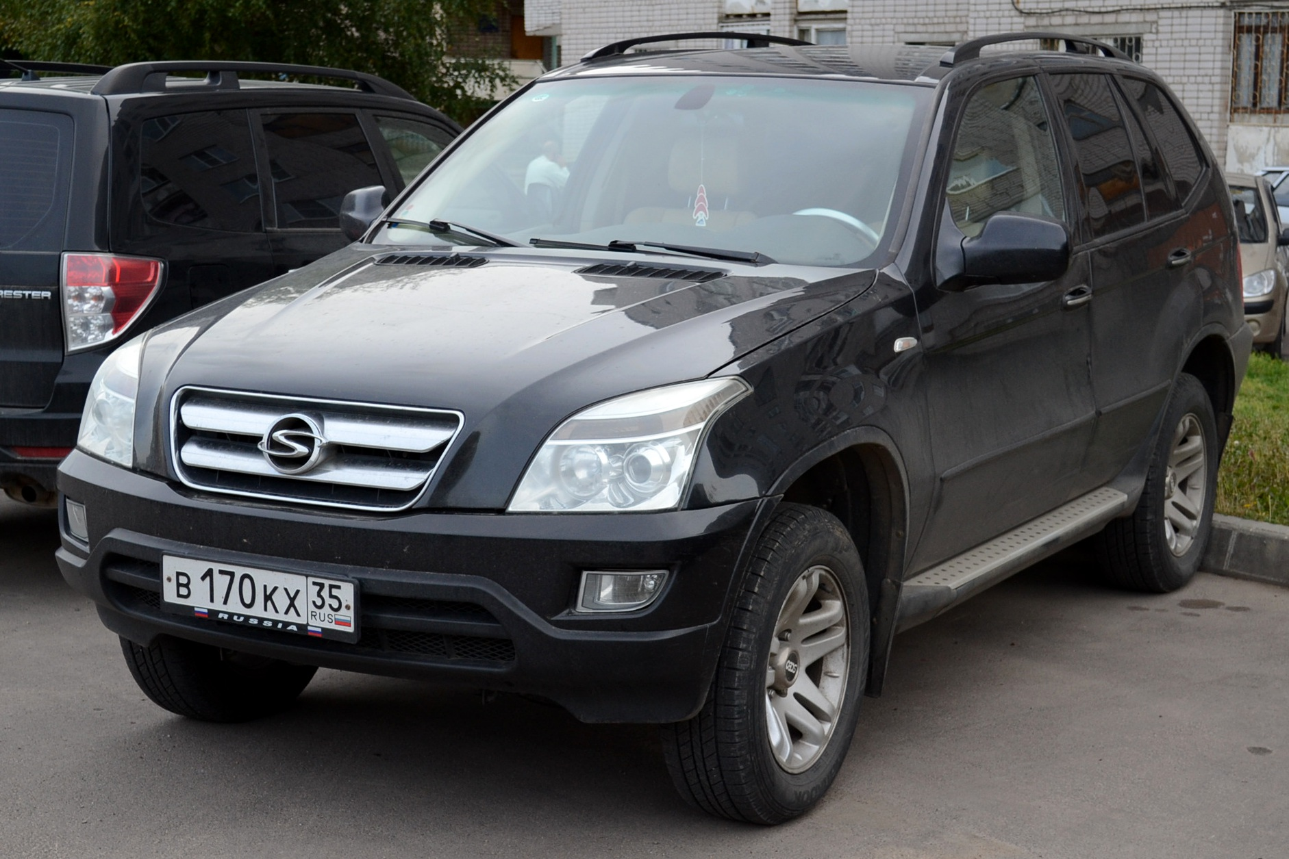 Автомобиль Shuanghuan SCEO